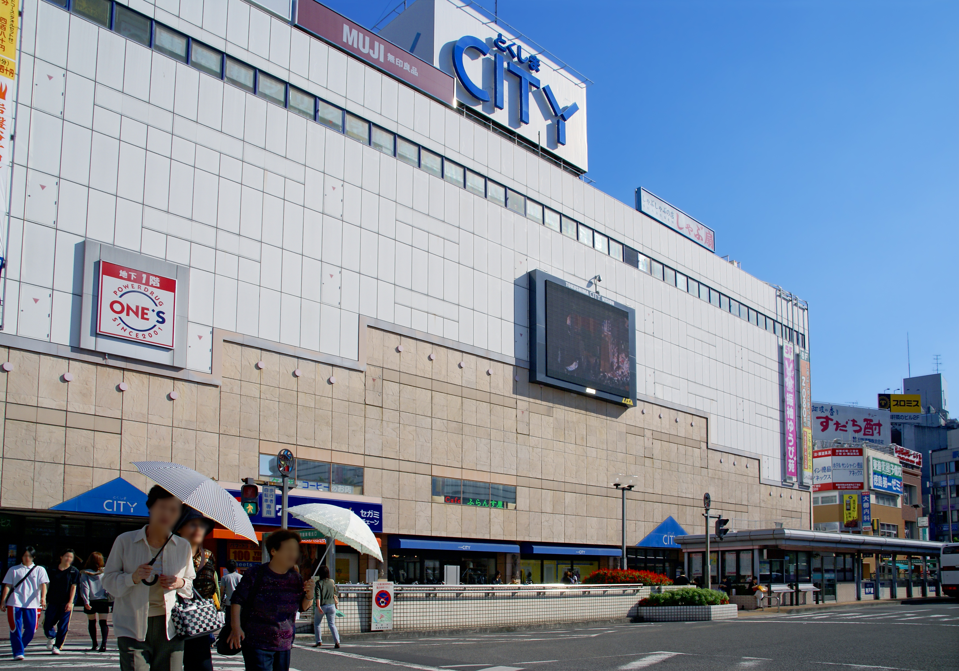 Tokushima CITY in Tokushima, Tokushima prefecture, Japan